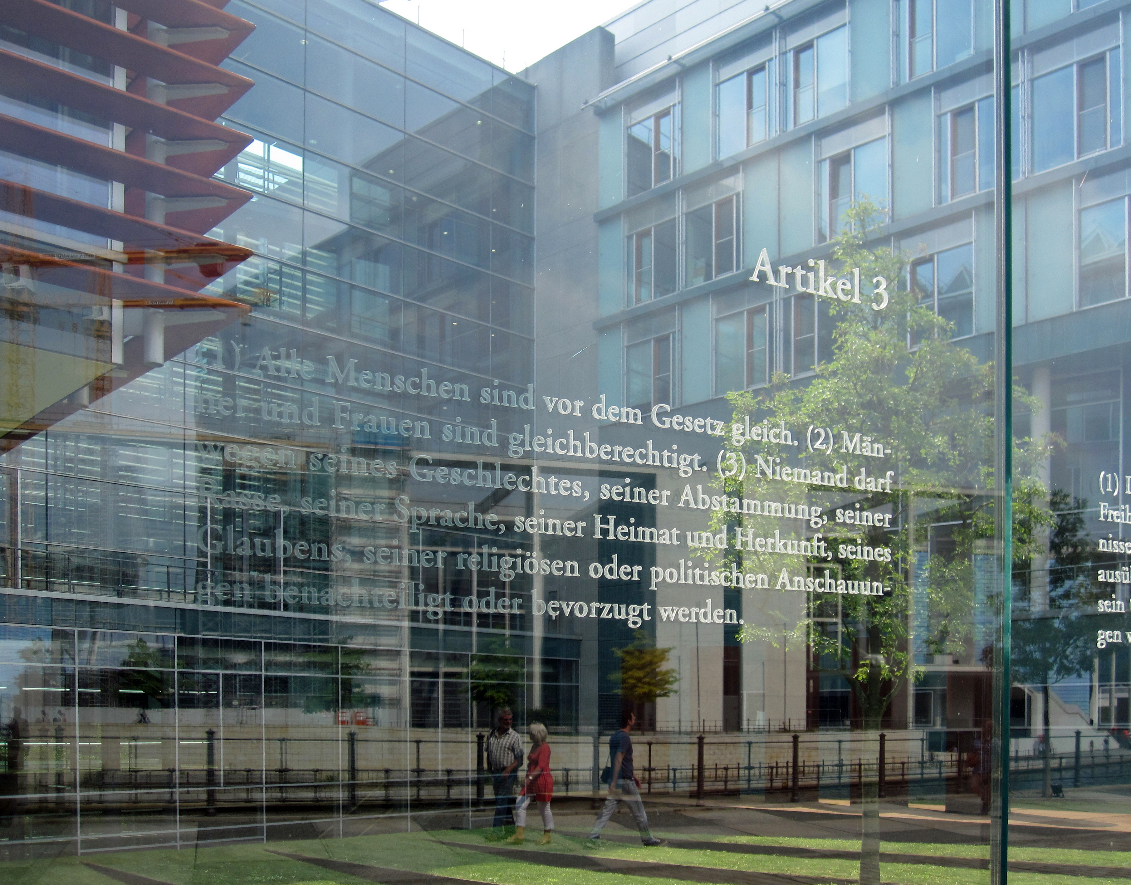 Bundestagsgebäude in Berlin: Der israelische Künstler Dani Karavan hat in drei Meter hohe Glasscheiben, die einen Außenhof des Jakob-Kaiser-Hauses im Uferbereich zur Spree begrenzen, die 19 Grundrechtsartikel des Grundgesetzes mit Laser eingraviert. „Die Grundrechtsartikel schweben gleichsam in Augenhöhe vor dem Haus der Fraktionen, dem Jakob-Kaiser-Haus“ (Andreas Kaernbach, Deutscher Bundestag).